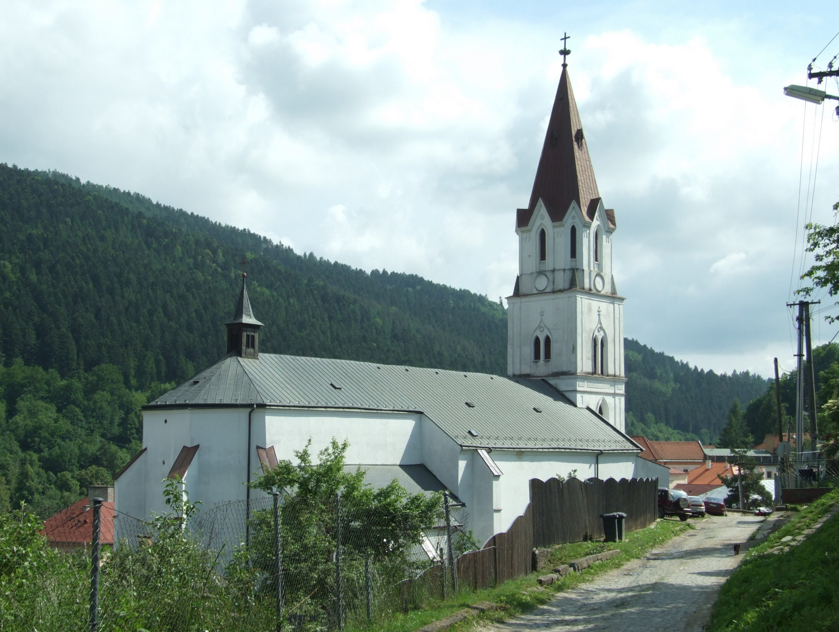 Kostol Nanebovzatia Panny Márie, 50 roky 14.st.